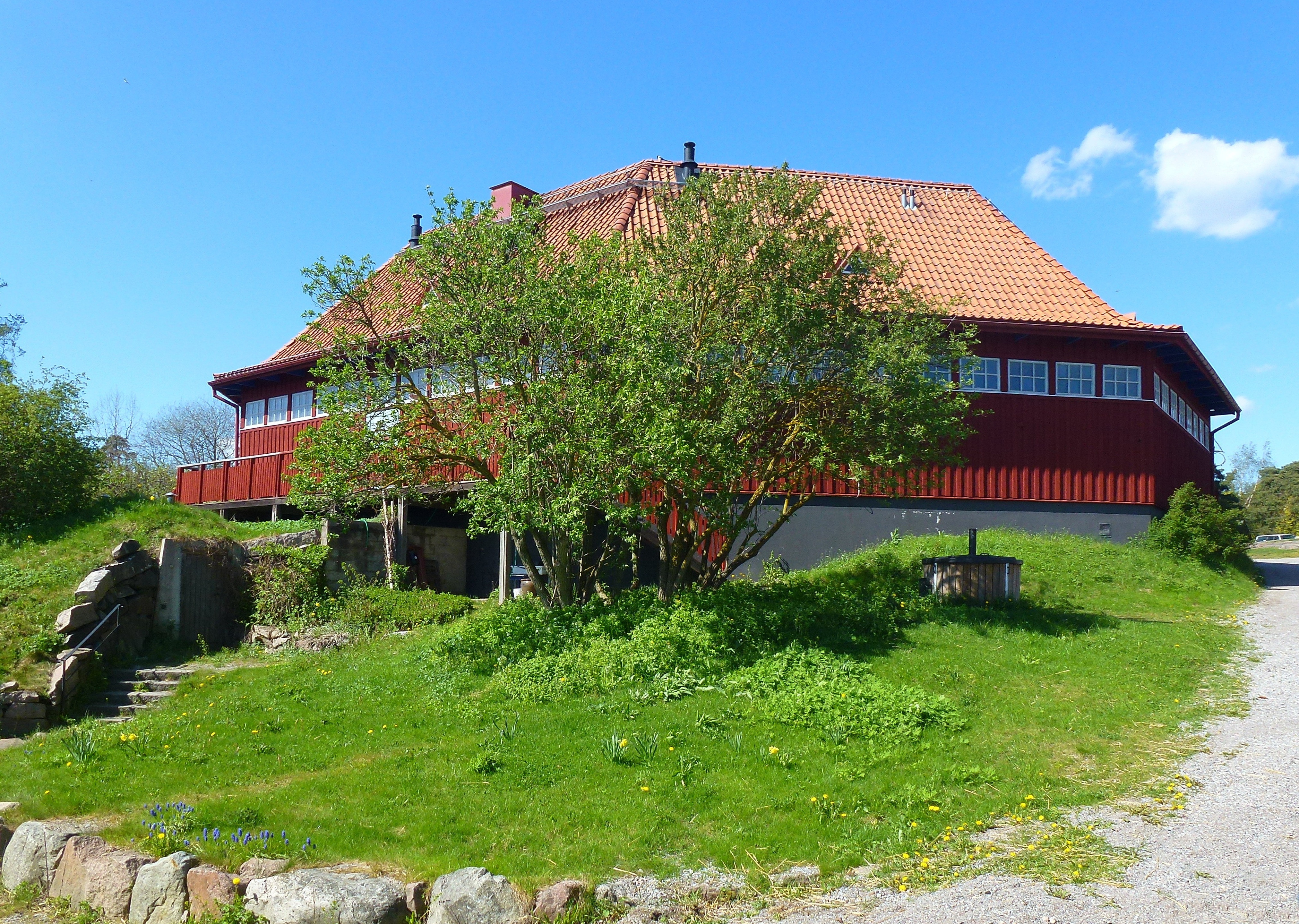 Hästskostallet